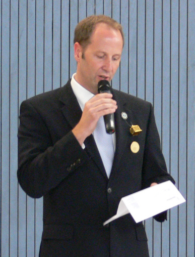 Rutenfest 2010, Oberbürgermeister Dr. Daniel Rapp begrüßt die Gäste der Stadt Ravensburg beim Imbiss in der Kuppelnauturnhalle